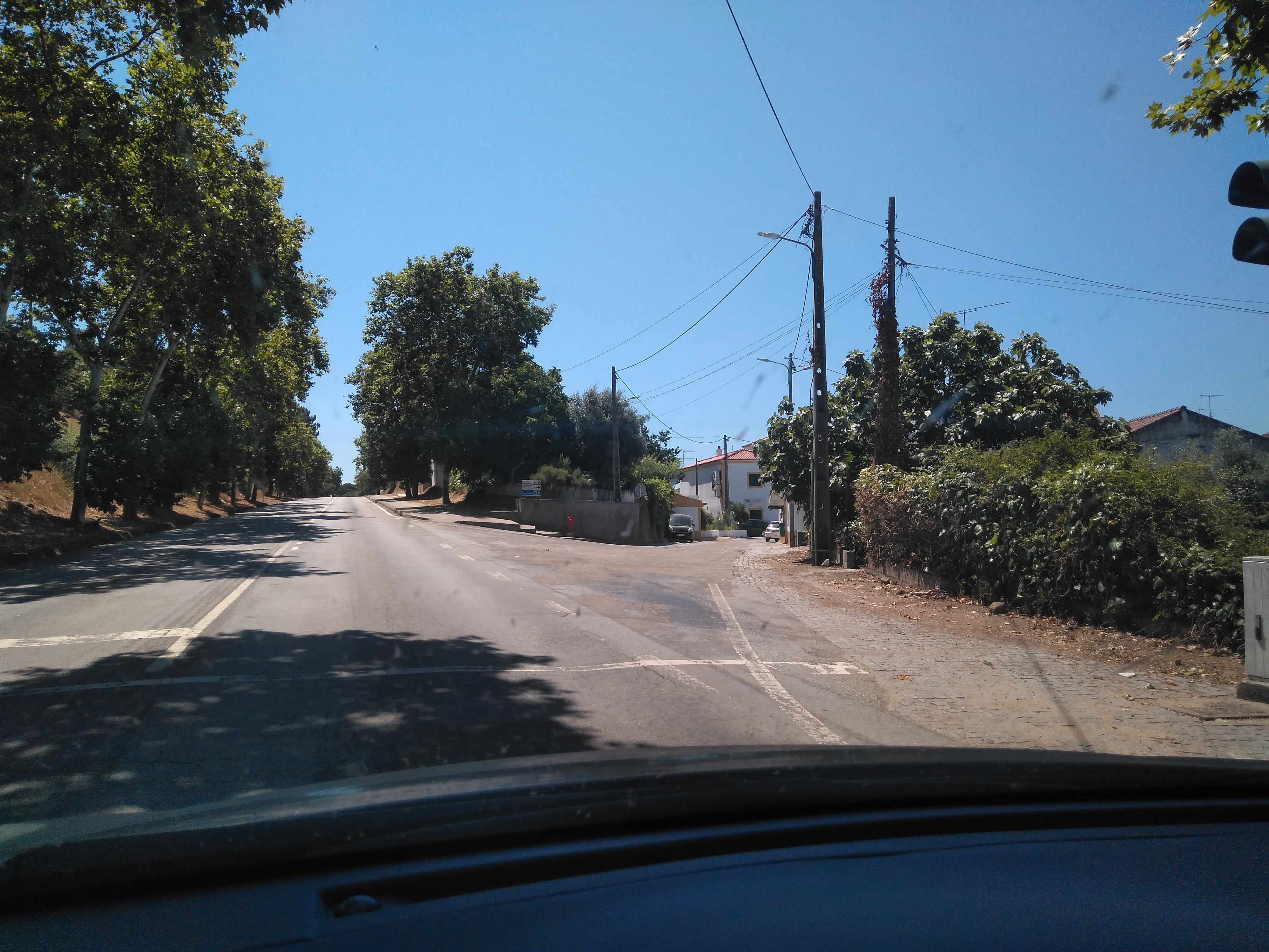 Fortios desde la travesía que lo cruza